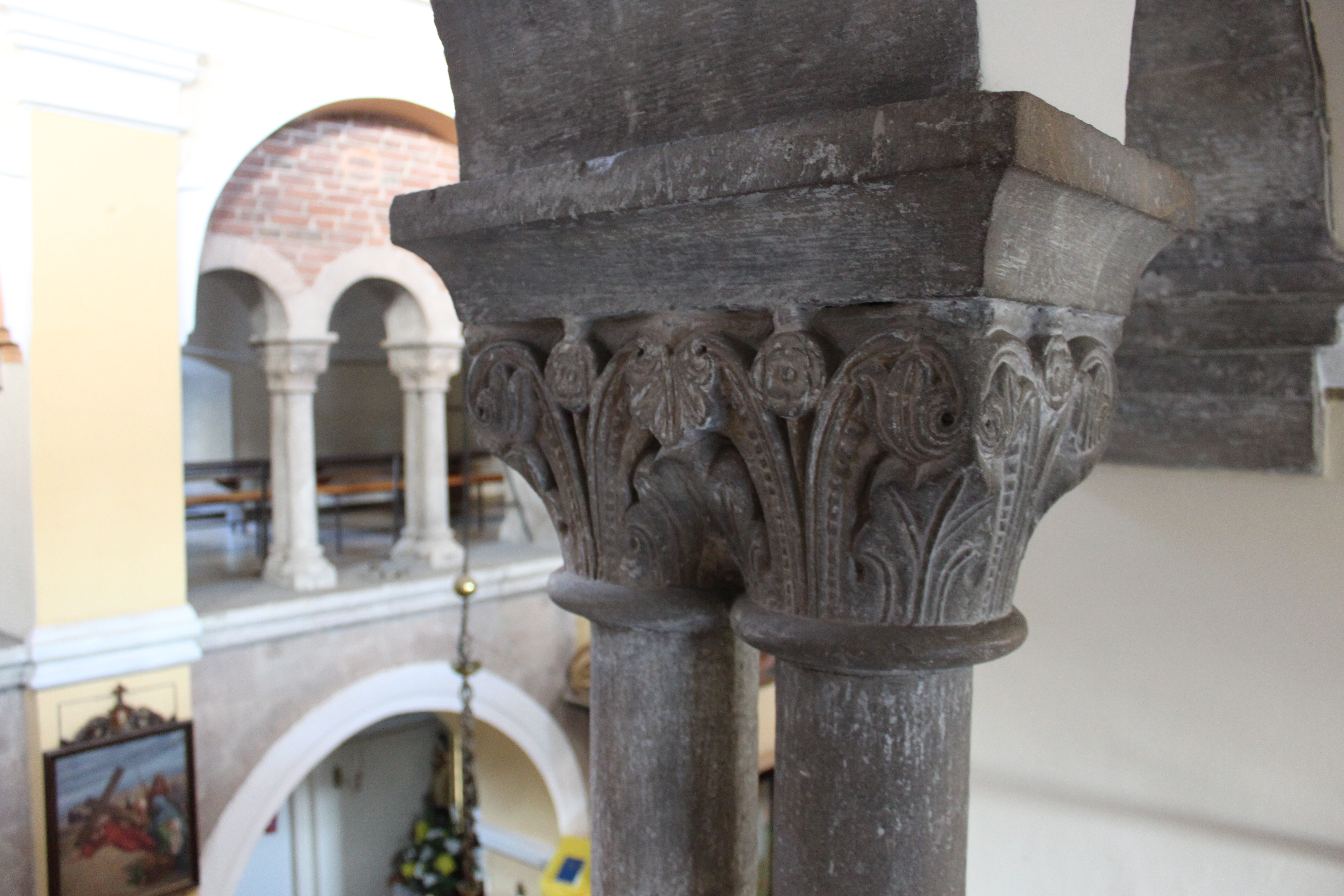 XV edycja Małpolskich Dni Dziedzictwa Kulturowego. Kościół pw. św. Wojciech w Kościelcu 18-19 maja. fot. J. Nowostawska-Gyalókay, MIK 2012